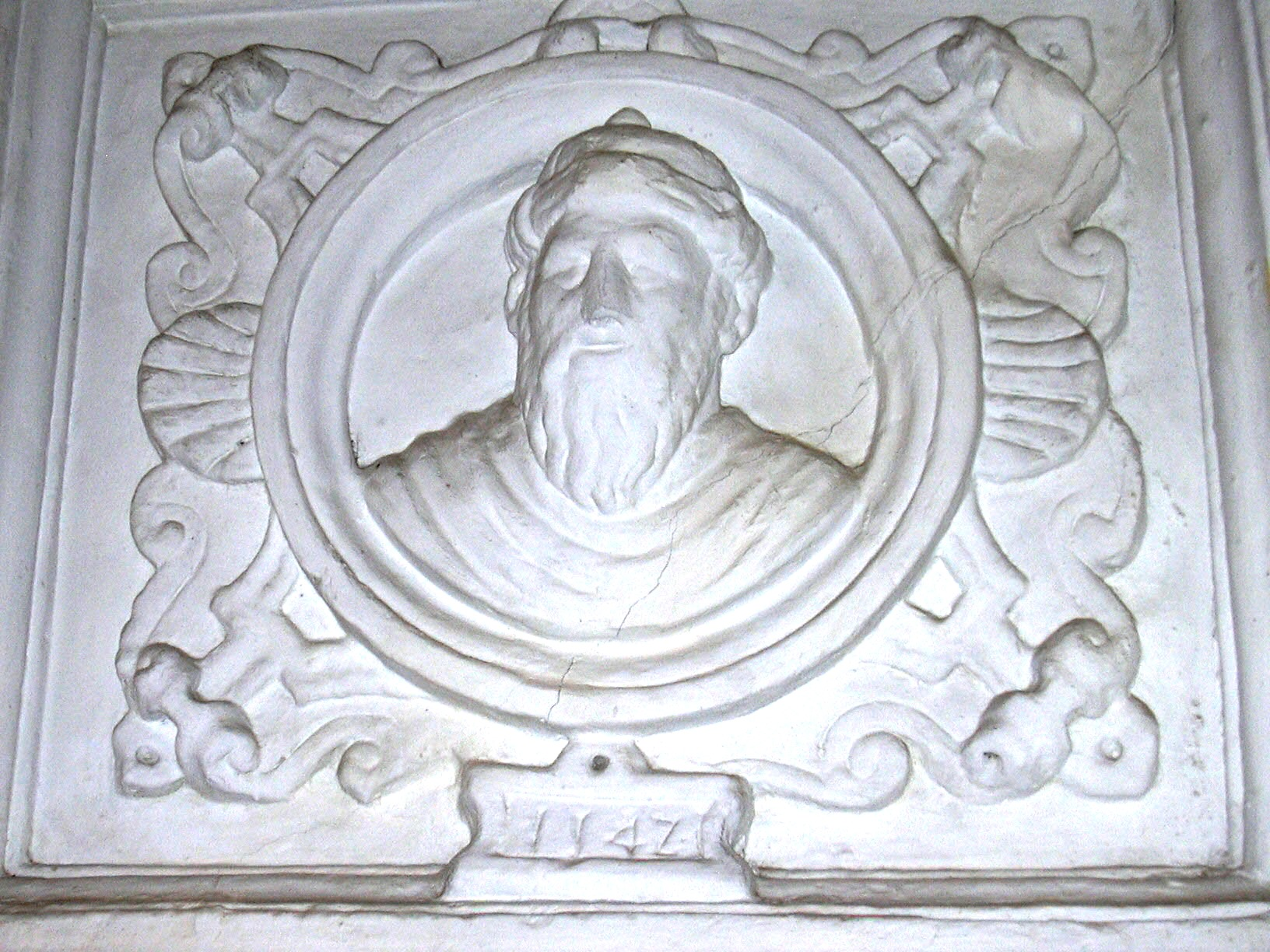 Casa de Miguel Donlope en Zaragoza Casa-palacio renacentista con techumbres mudéjares. Actualmente sede de la Real Maestranza de Caballería de Zaragoza. Medallón con imágen de Don Miguel Donlope